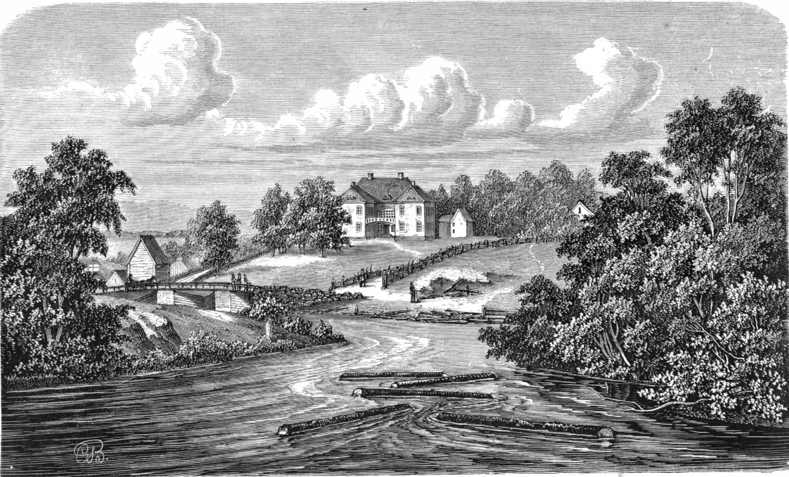 Eidsvollsbygningen, fra Nordiske Billeder, fjerde bind. København 1870.